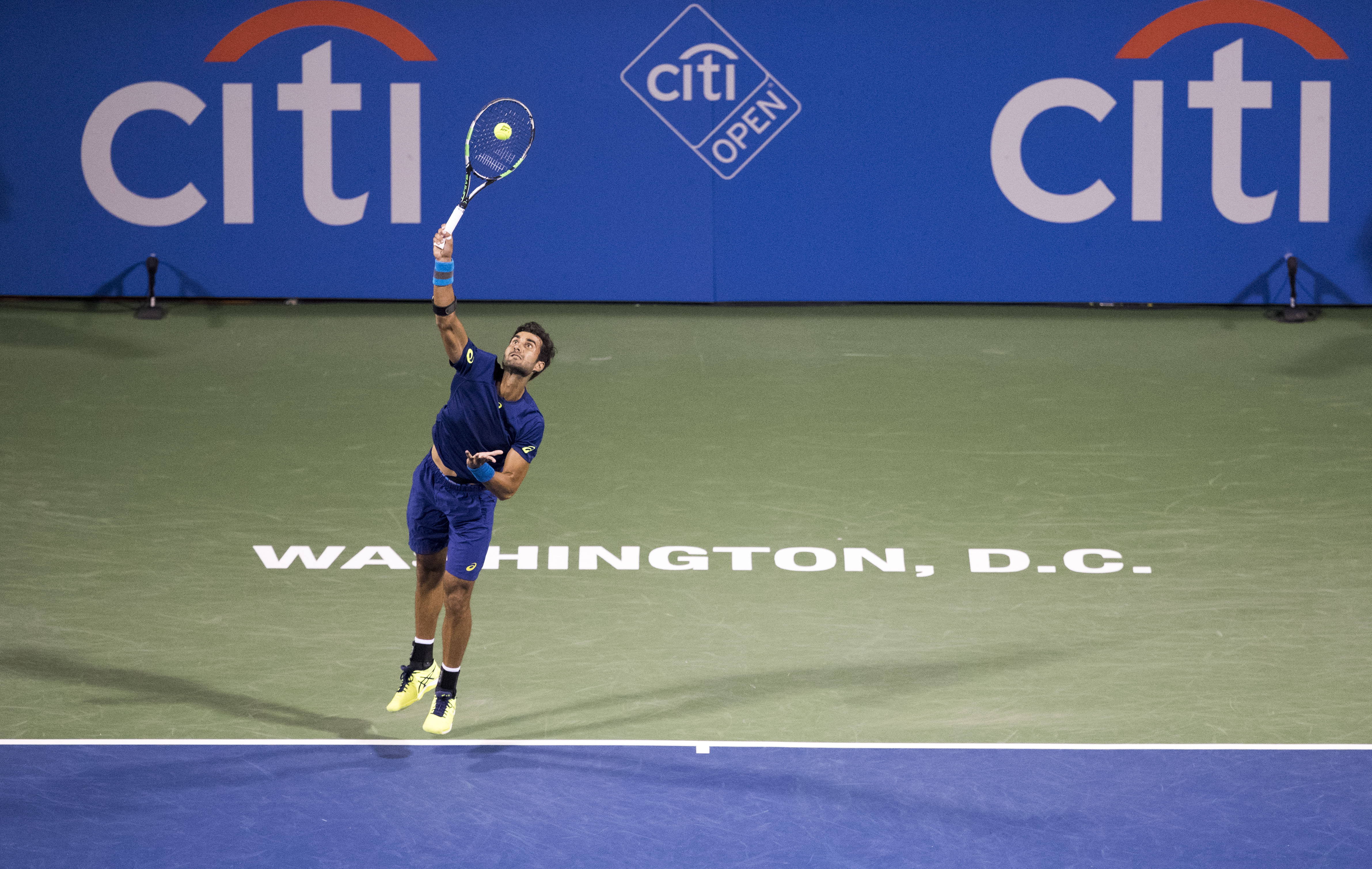 Citi Open Tennis 2017